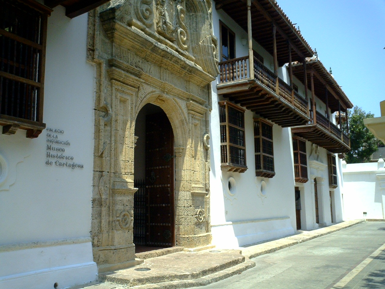 Palacio de la Inquisicion en Cartagena, Colombia La Inquisición fue el terror de los indígenas americanos en la época de la colonia